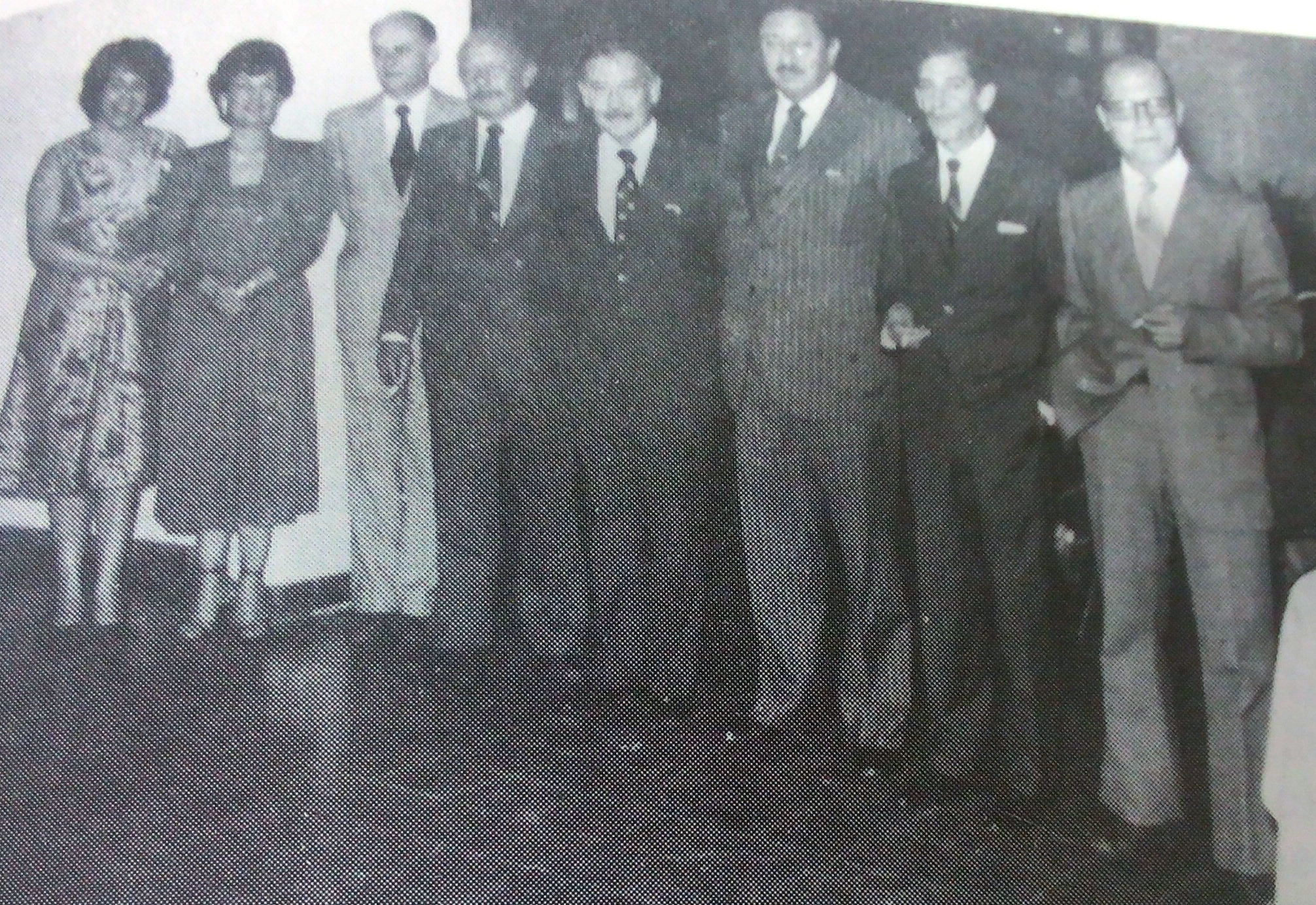 Grupo de abogados y escribanos que en 1958 fundaron el foro de Oberá, dando de esa manera nacimiento a la justicia obereña.